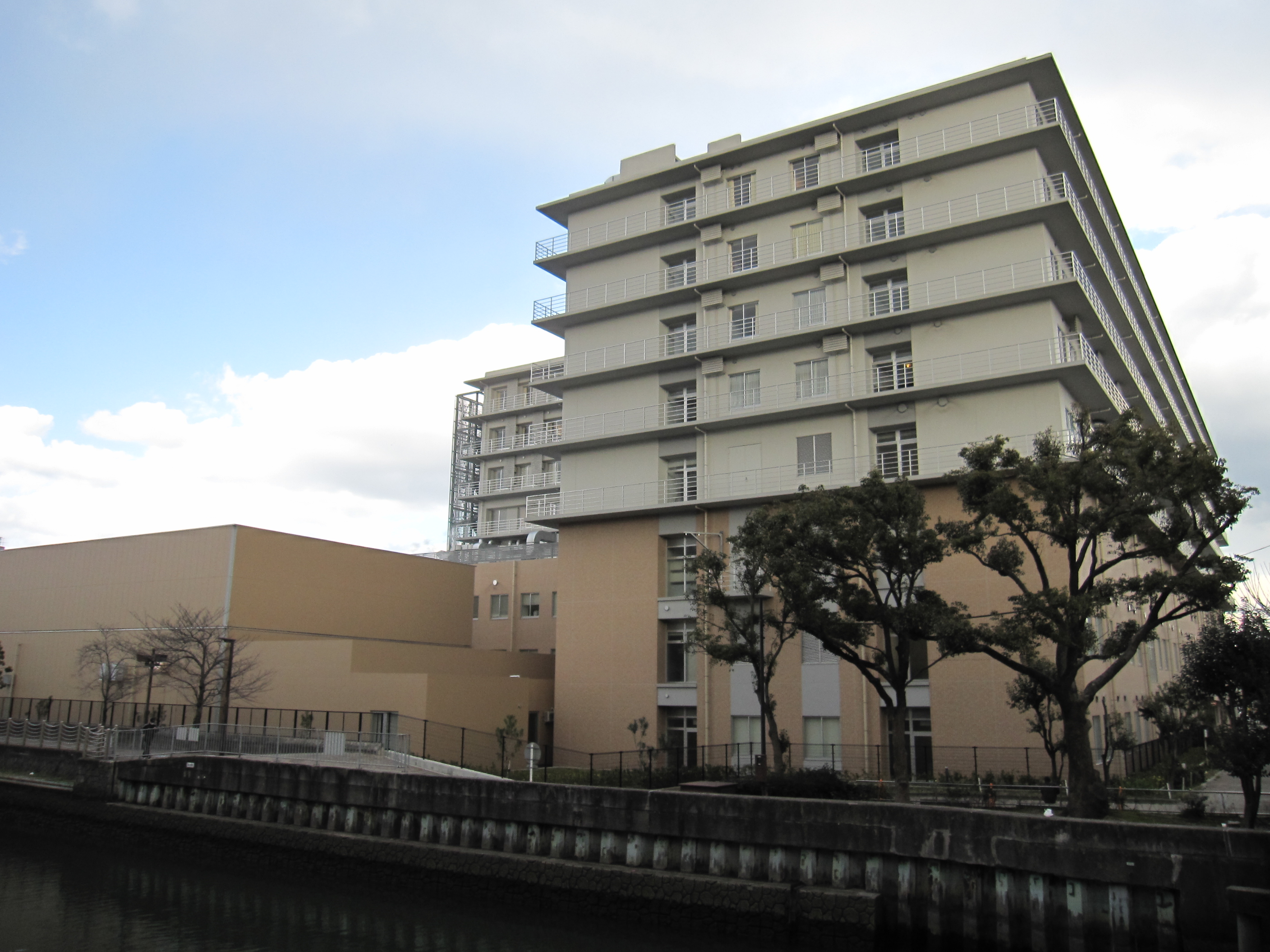 大阪府済生会野江病院